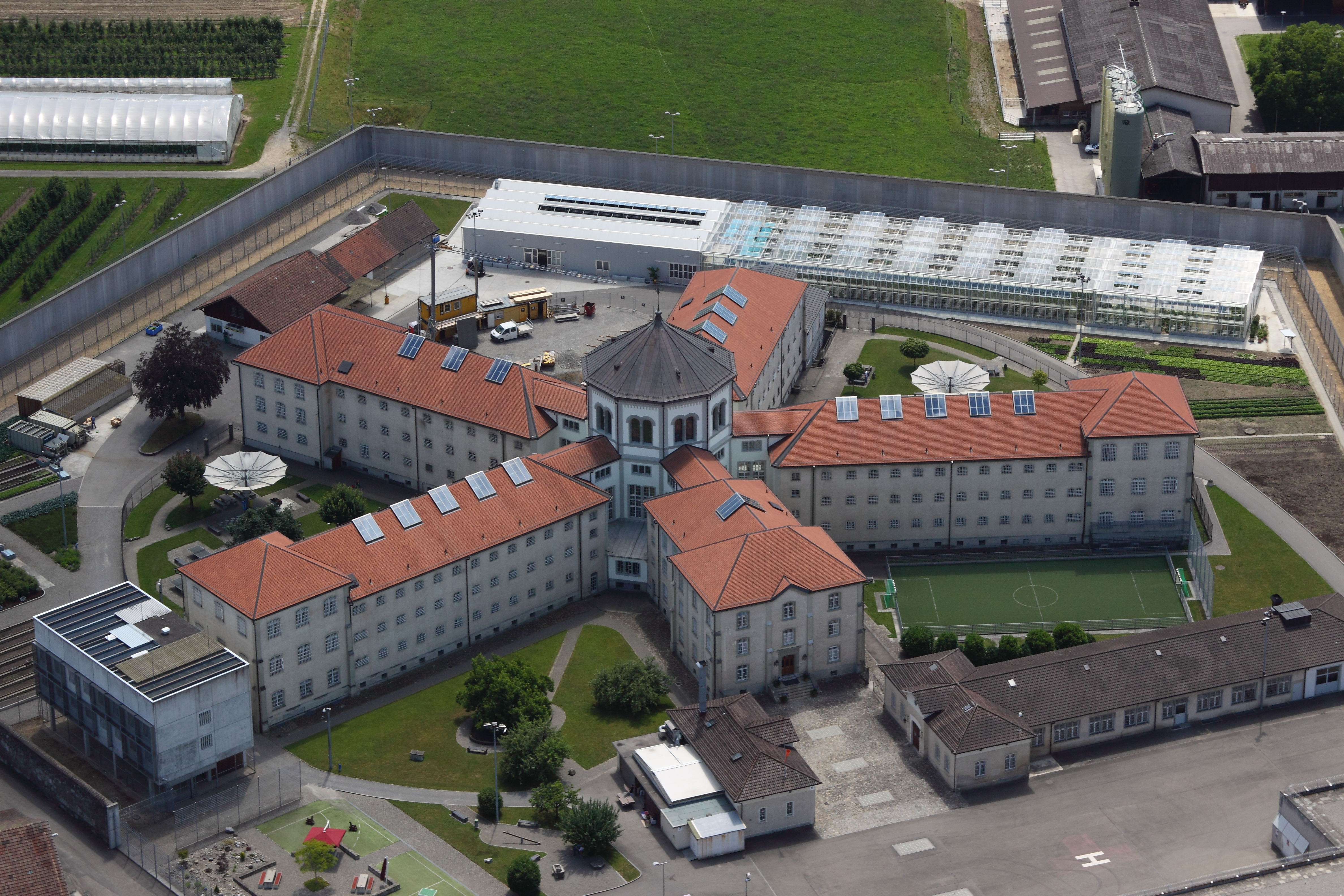 Strafanstalt Lenzburg aus der Luft